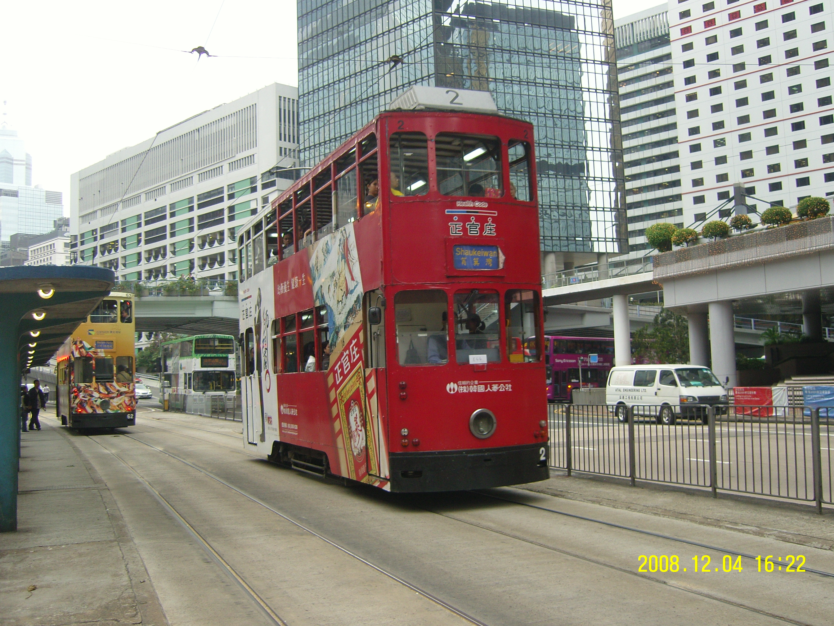 中文（香港）: 香港電車#2